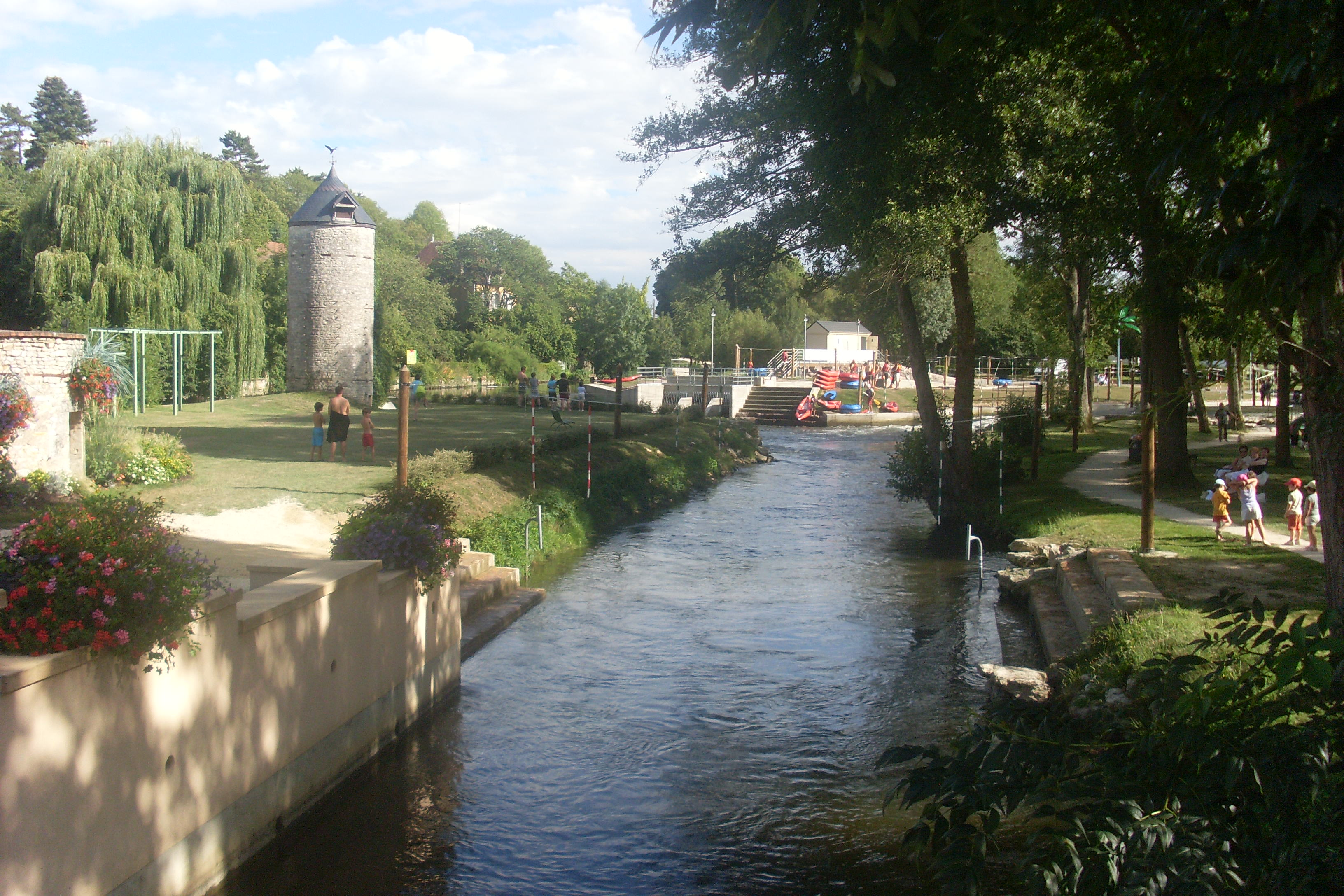 Le Cher à Chateauneuf-sur-Cher